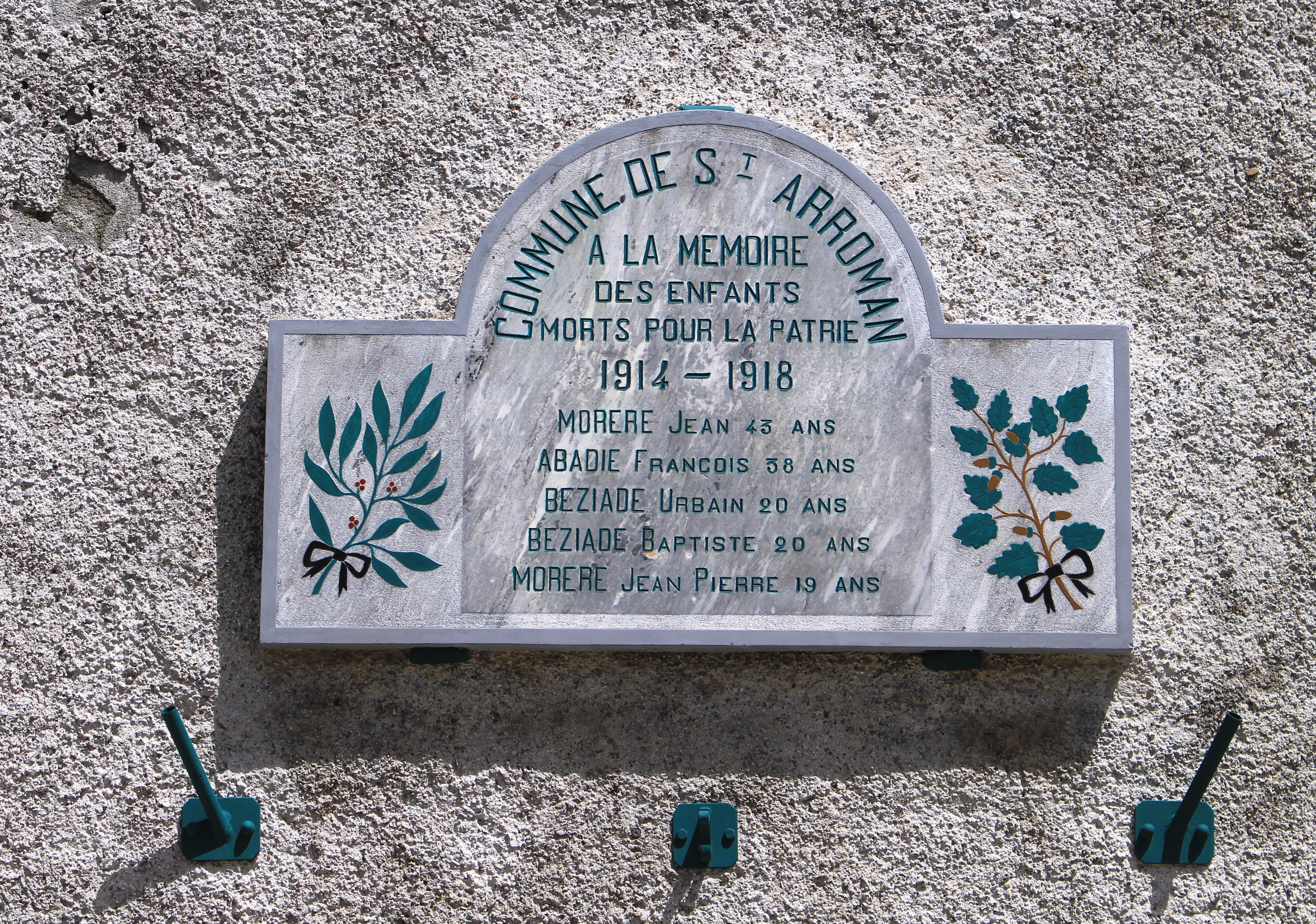 Monument aux morts de Saint-Arroman (Hautes-Pyrénées)